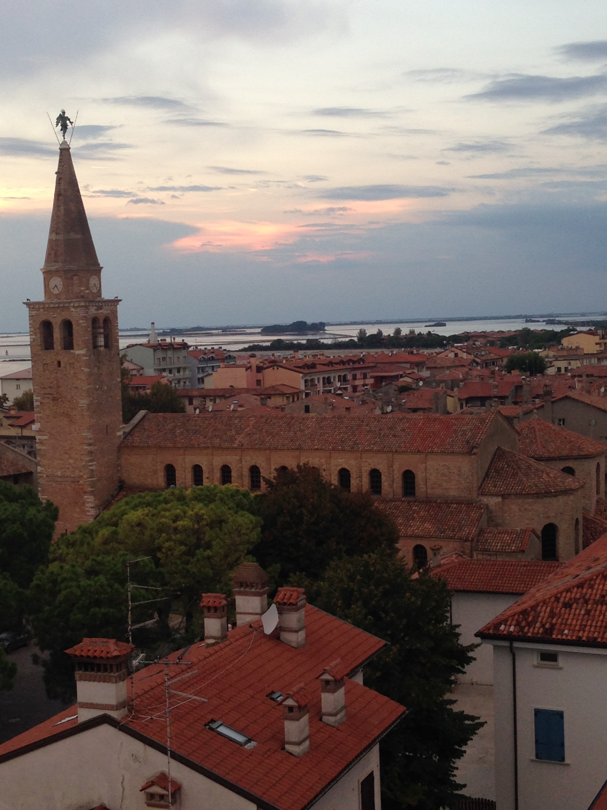 immagine dall'alto della Basilica di Santa Eufemia